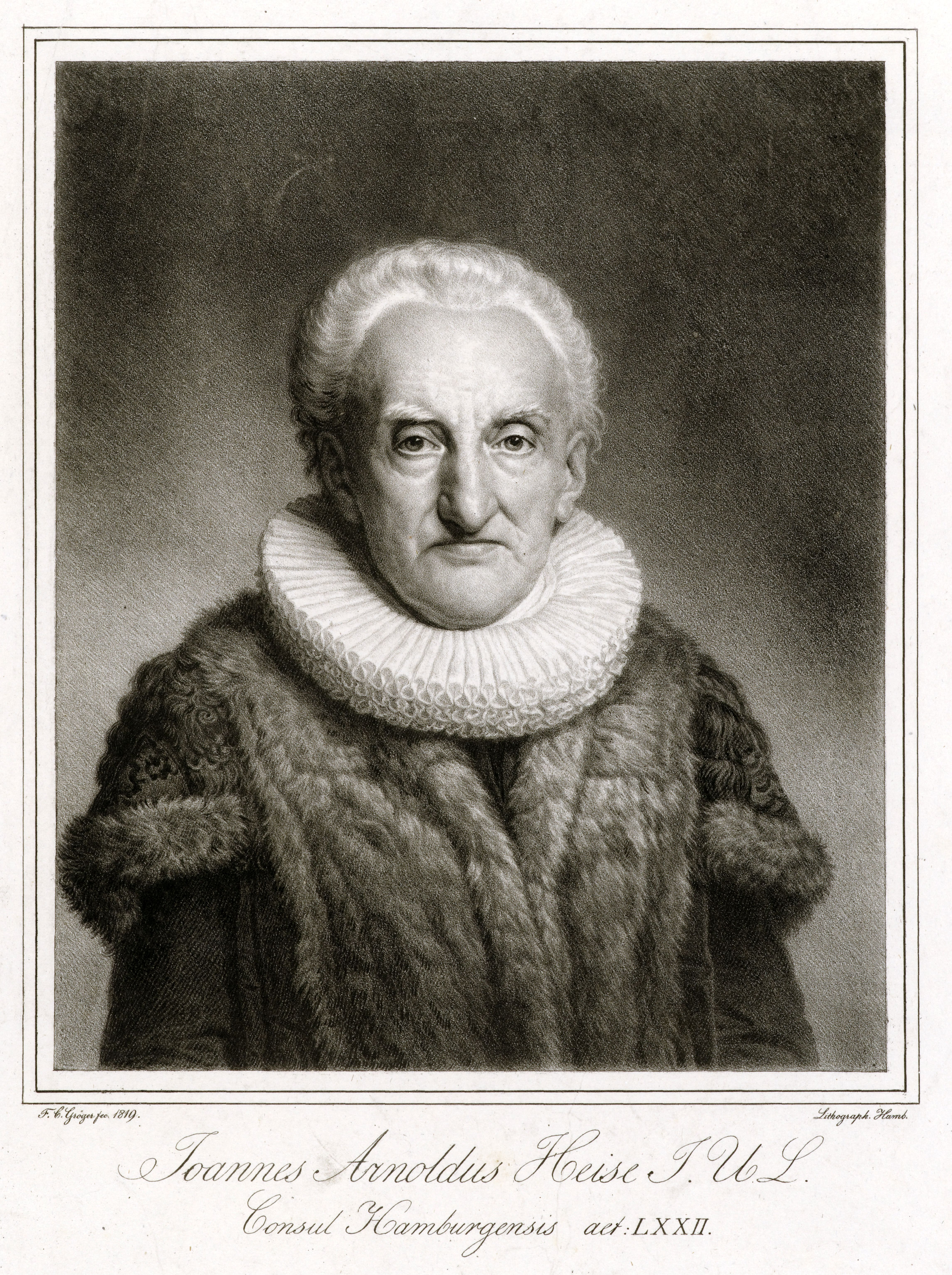 Johannes Arnoldus Heise J. U. L.